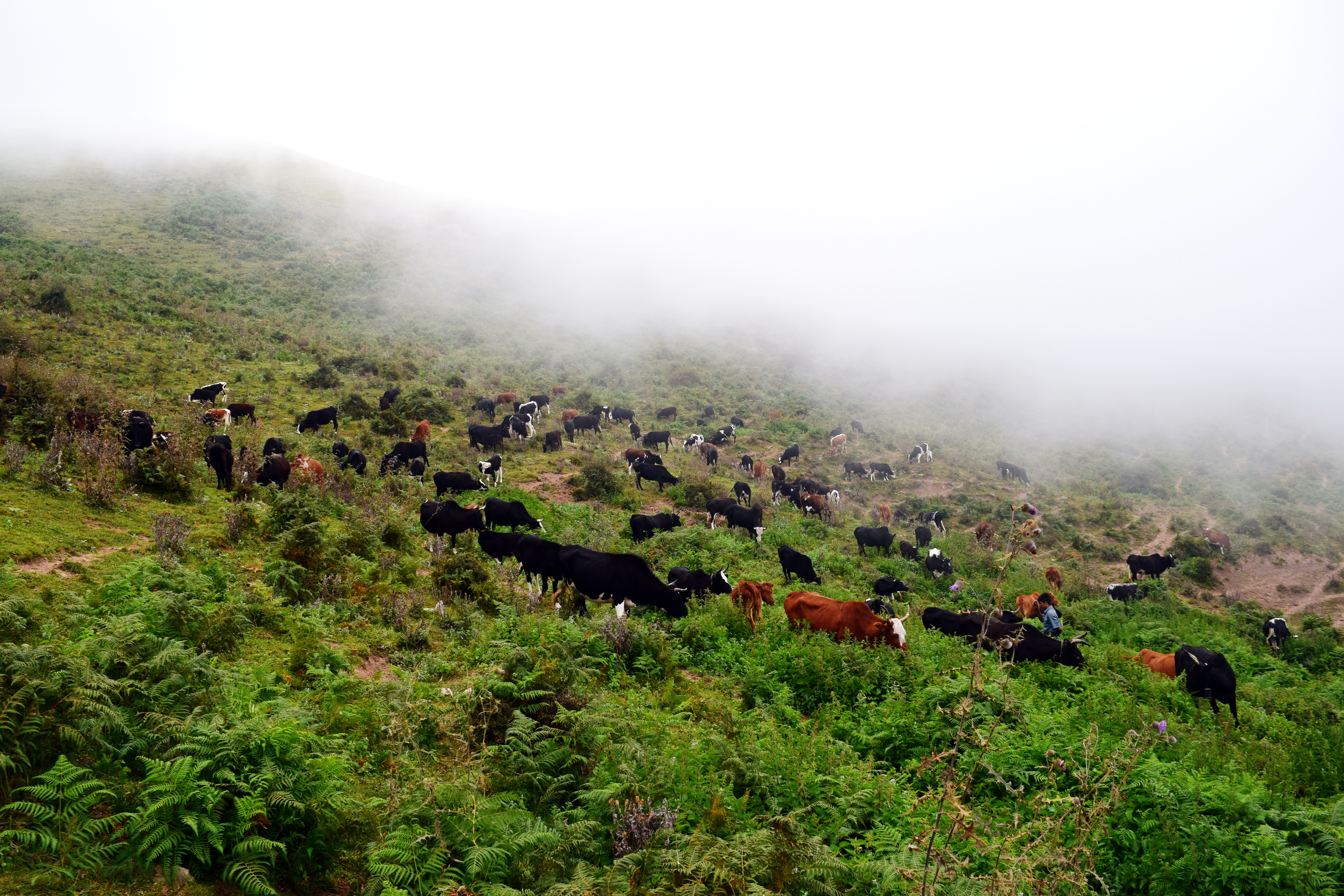 دامپروری بومی و سنتی در امل